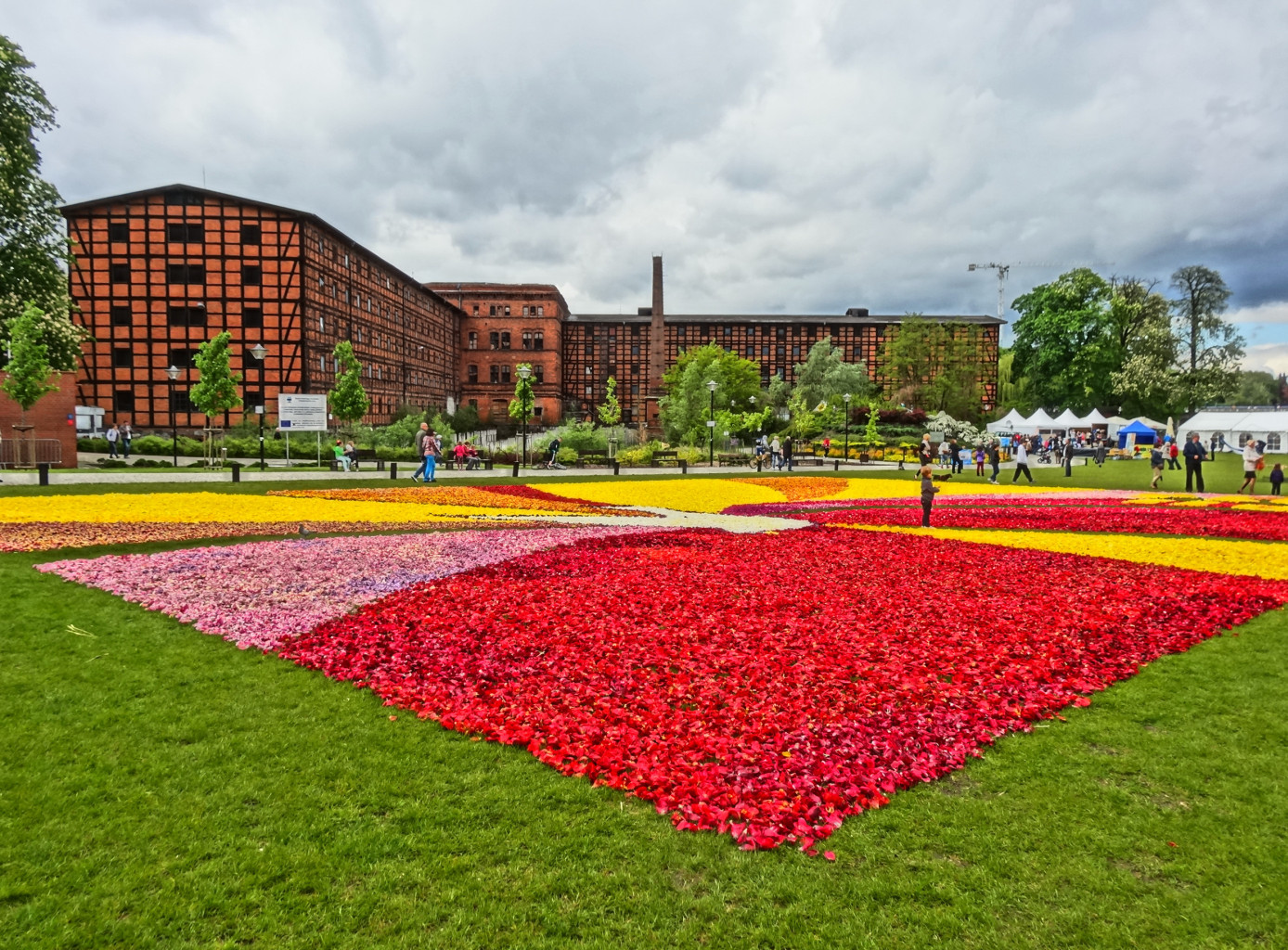 Dywany kwiatowe na Wyspie Młyńskiej w Bydgoszczy